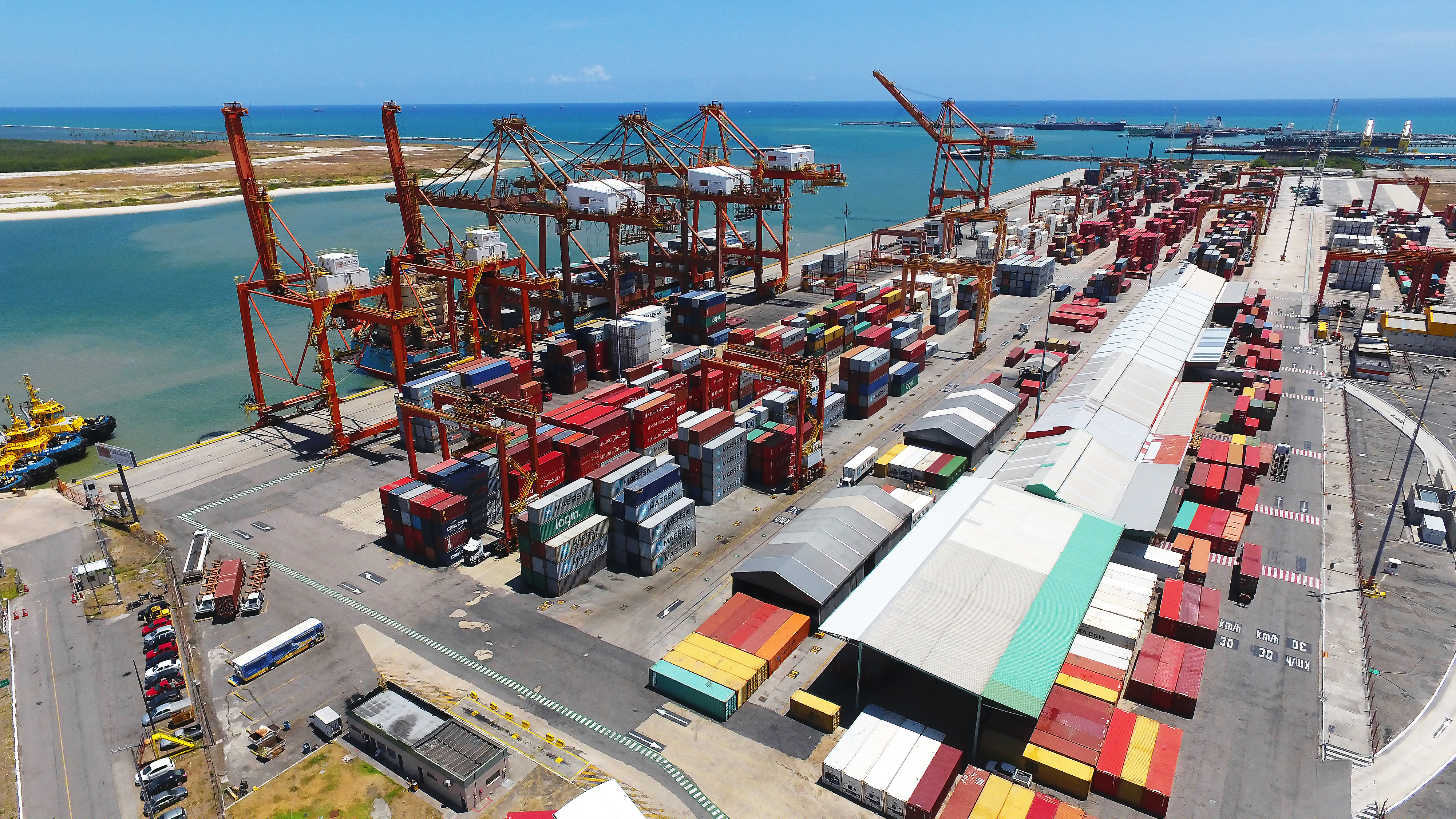 DCIM\100MEDIA\DJI_0037.JPG